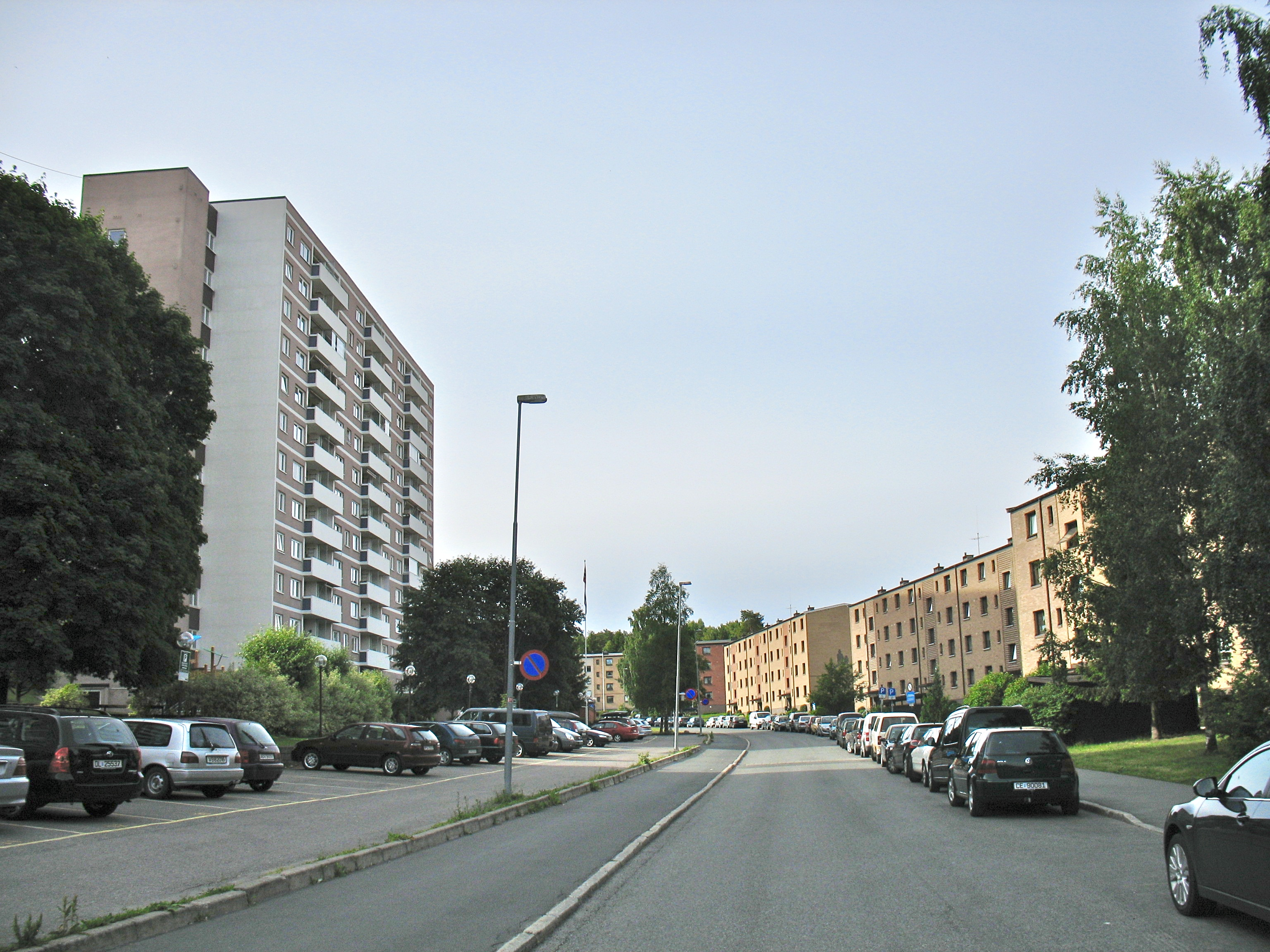 Bølerlia. Bøler i Oslo.